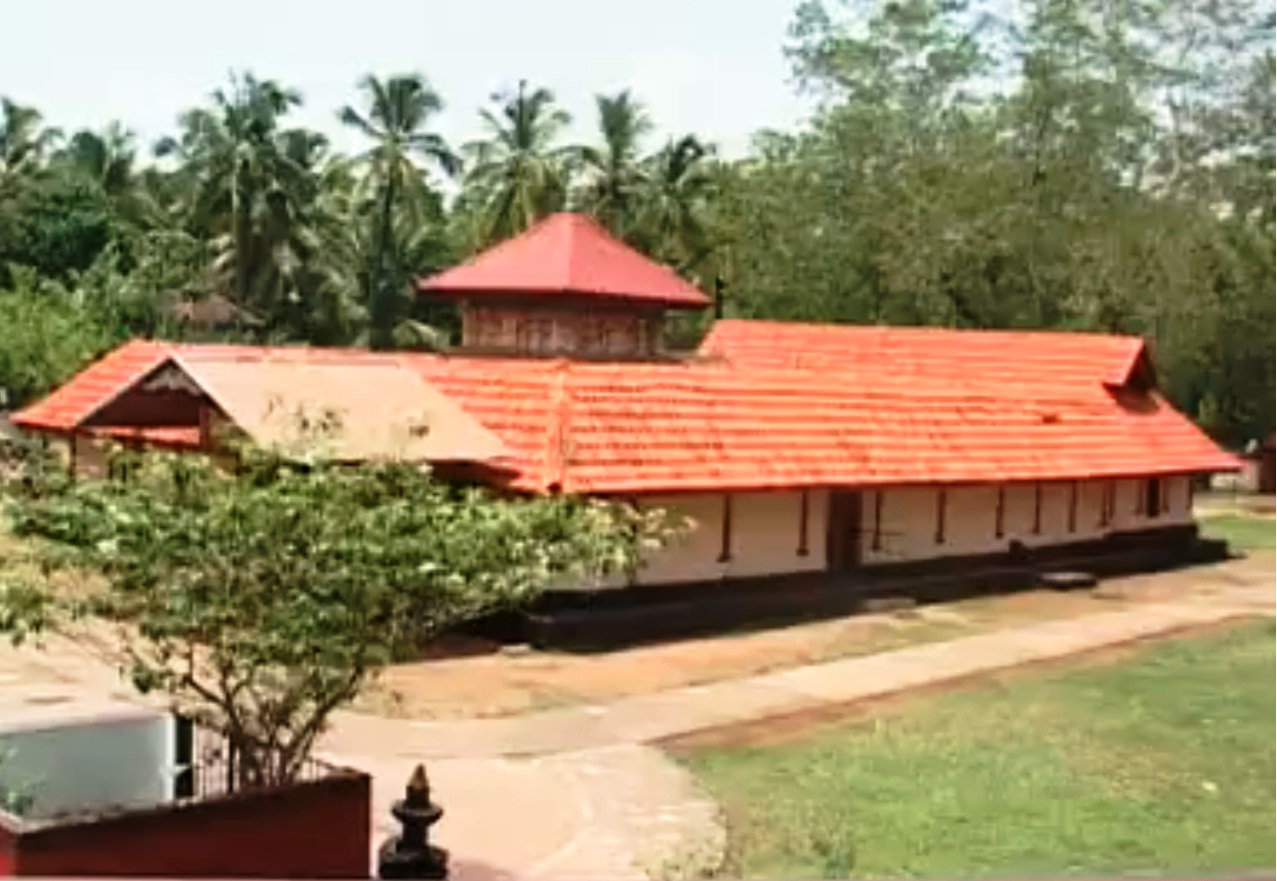 കാട്ടകാമ്പാൽക്ഷേത്രം